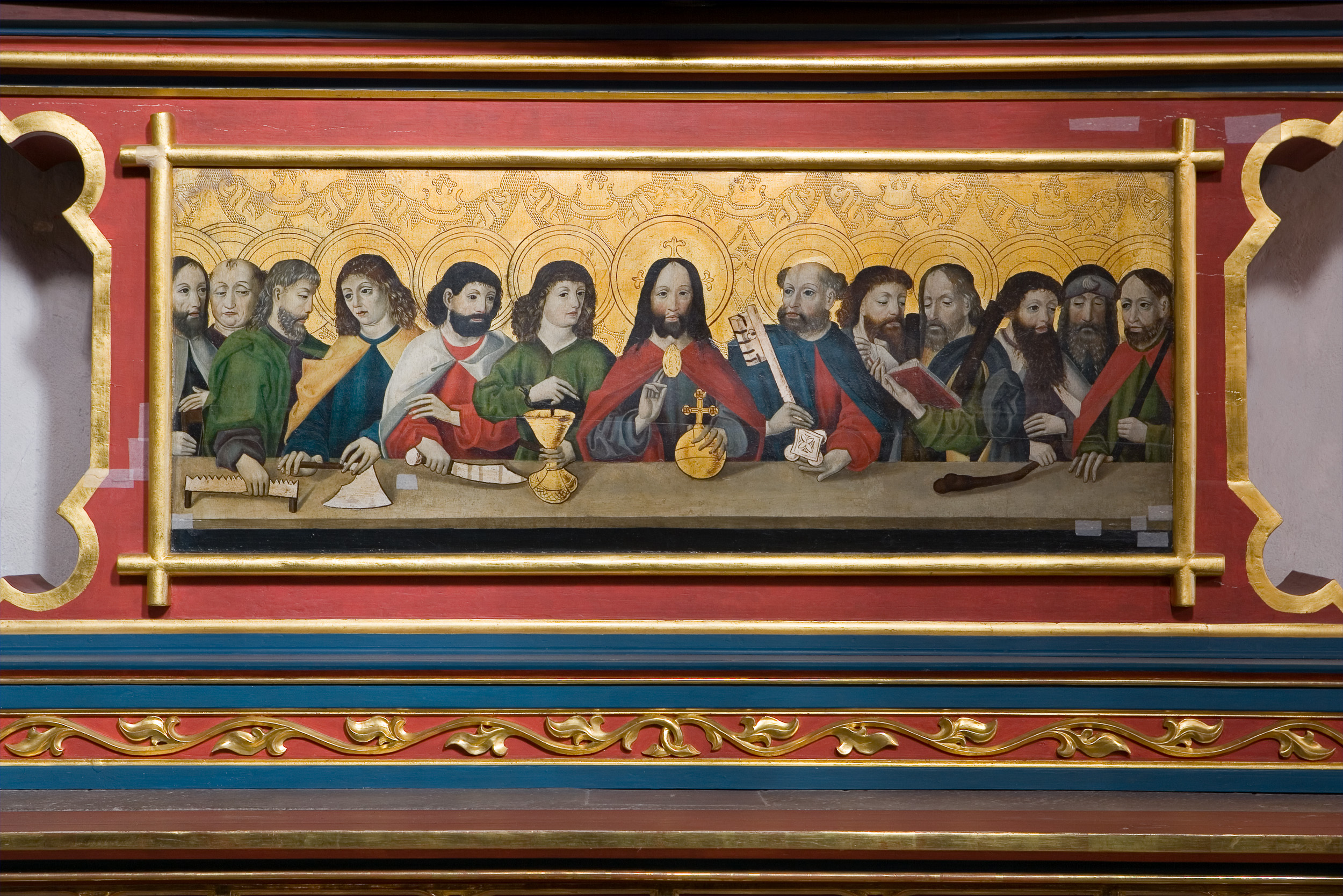 Mittelalterliches Predellengemälde des um 1480 entstandenen Marienaltars im nördlichen Hauptschiff der Leonhardskirche in Frankfurt am Main. Selber fotografiert im März 2008, Doppellizensierung GFDL & CC-BY-SA 2.5.